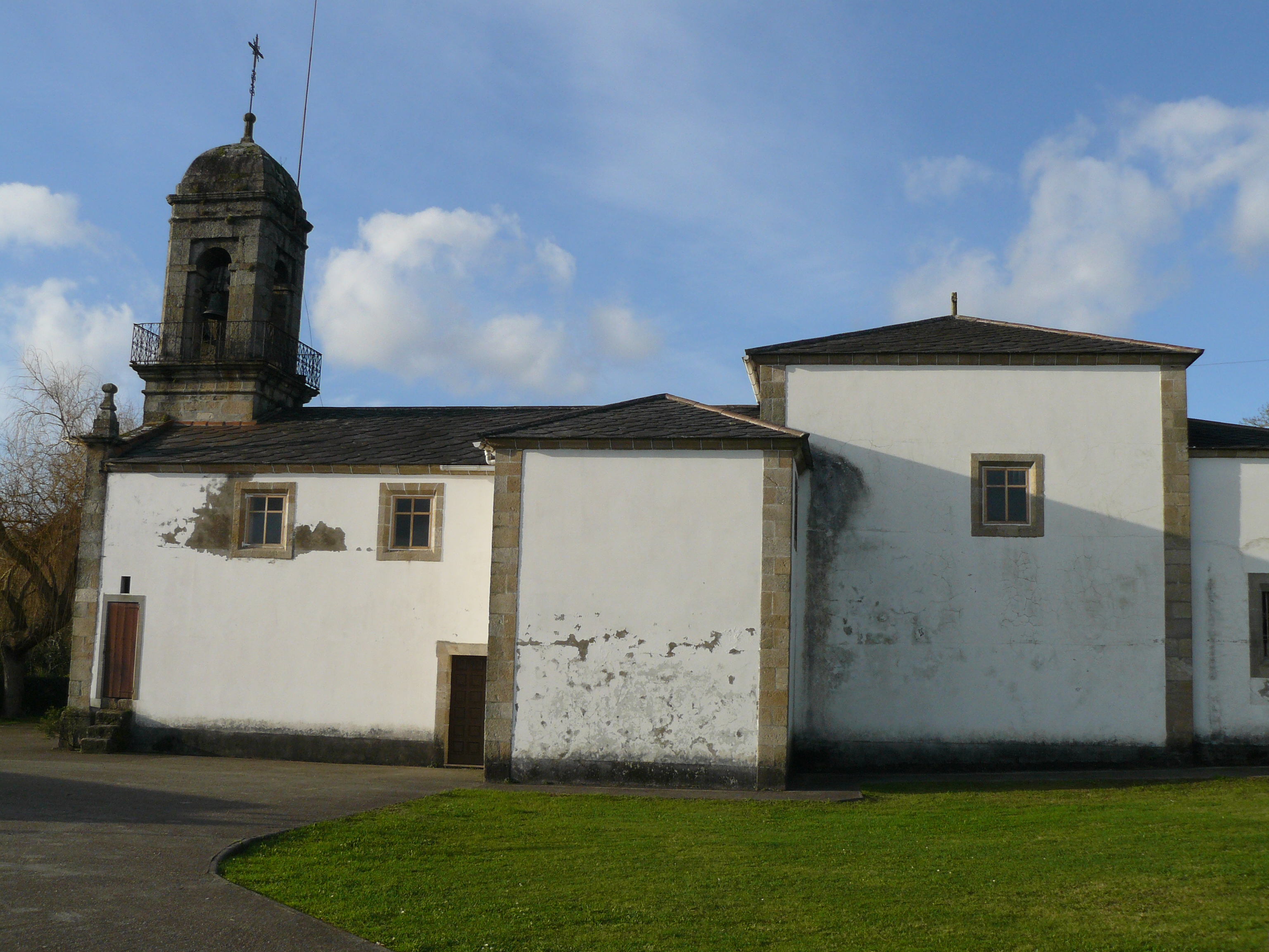 Igrexa de Pedroso (Narón)